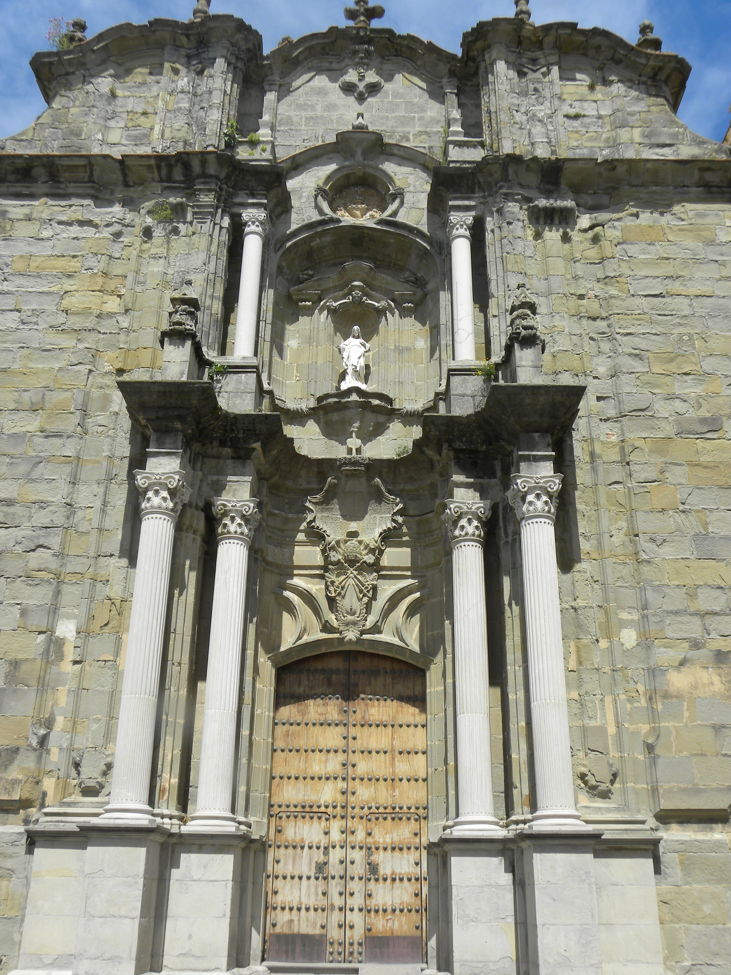 Portada barroca (1778) de la Iglesia de San Mateo, Tarifa (Campo de Gibraltar, provincia de Cádiz, Andalucía).